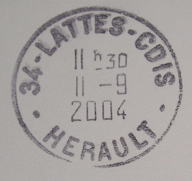 Description:Cachet d'oblitération généralement utilisé dans les bureaux de poste français actuellement.Source: Photographié sur une enveloppe reçu par Utilisateur:Sebjarod Licence: le modèle date du XIXe siècle : circulaire, date, lieu, département, numéro du département. Catégorie:Image de timbres